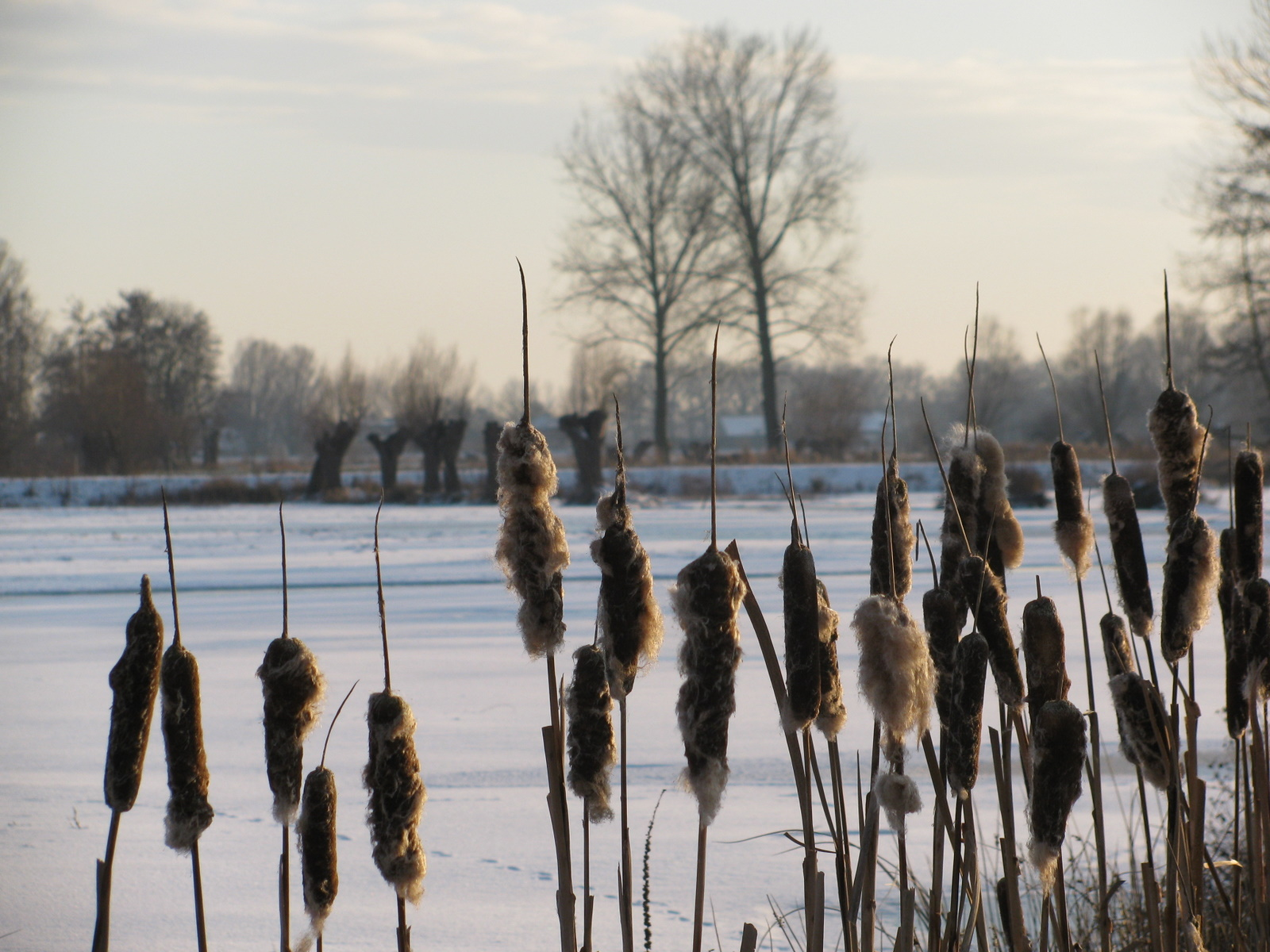 Westerplas